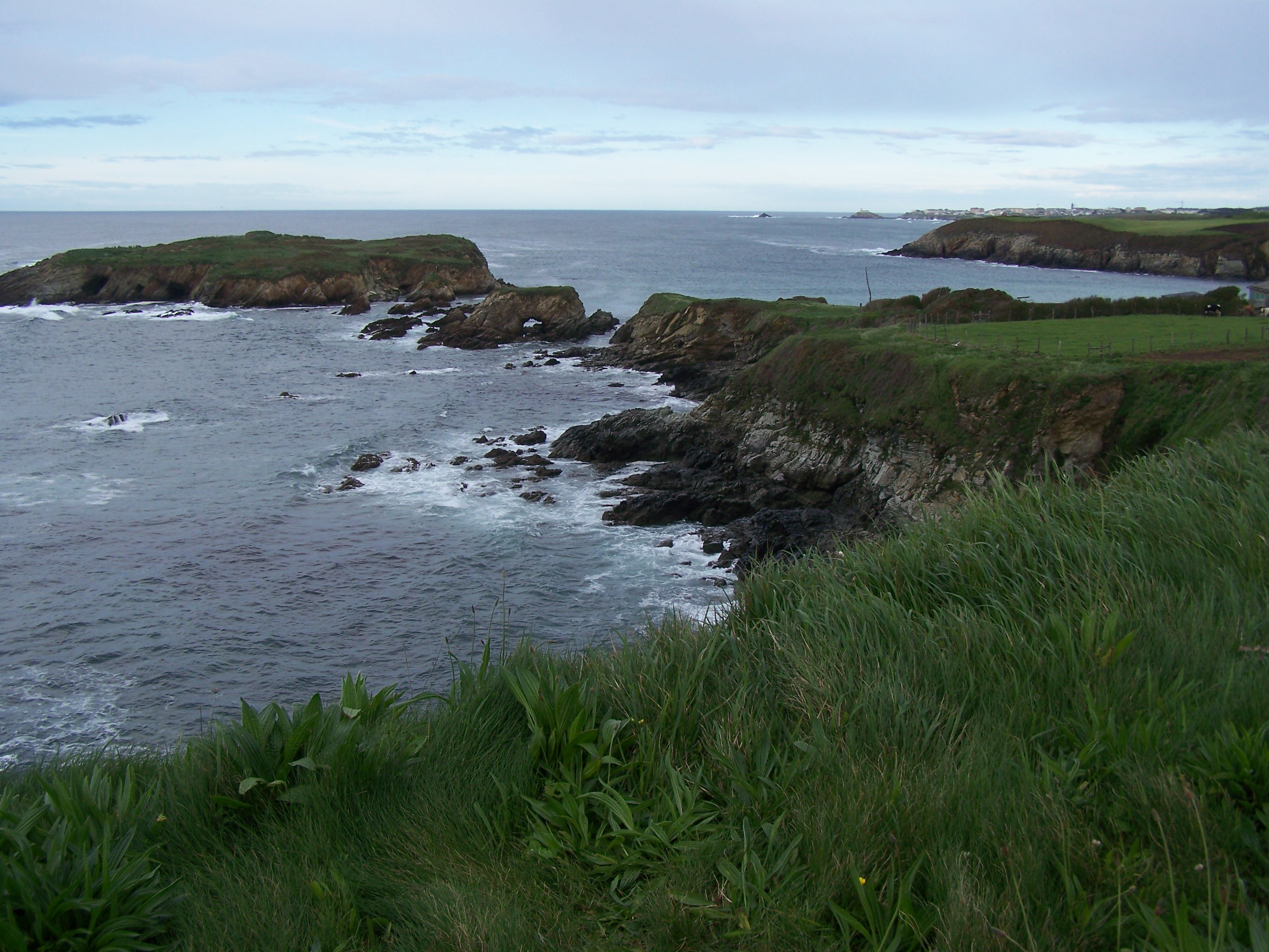 Serantes